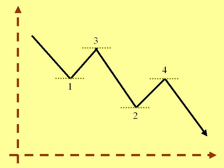 Description: esquema de una tendencia bajista con soportes y resistencias Source: Trabajo propio Author: LCB Date: Julio 21, 2006 Authorization: Dominio Público